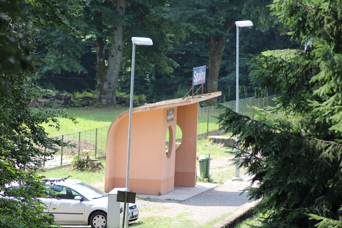 Železniční zastávka Spálov